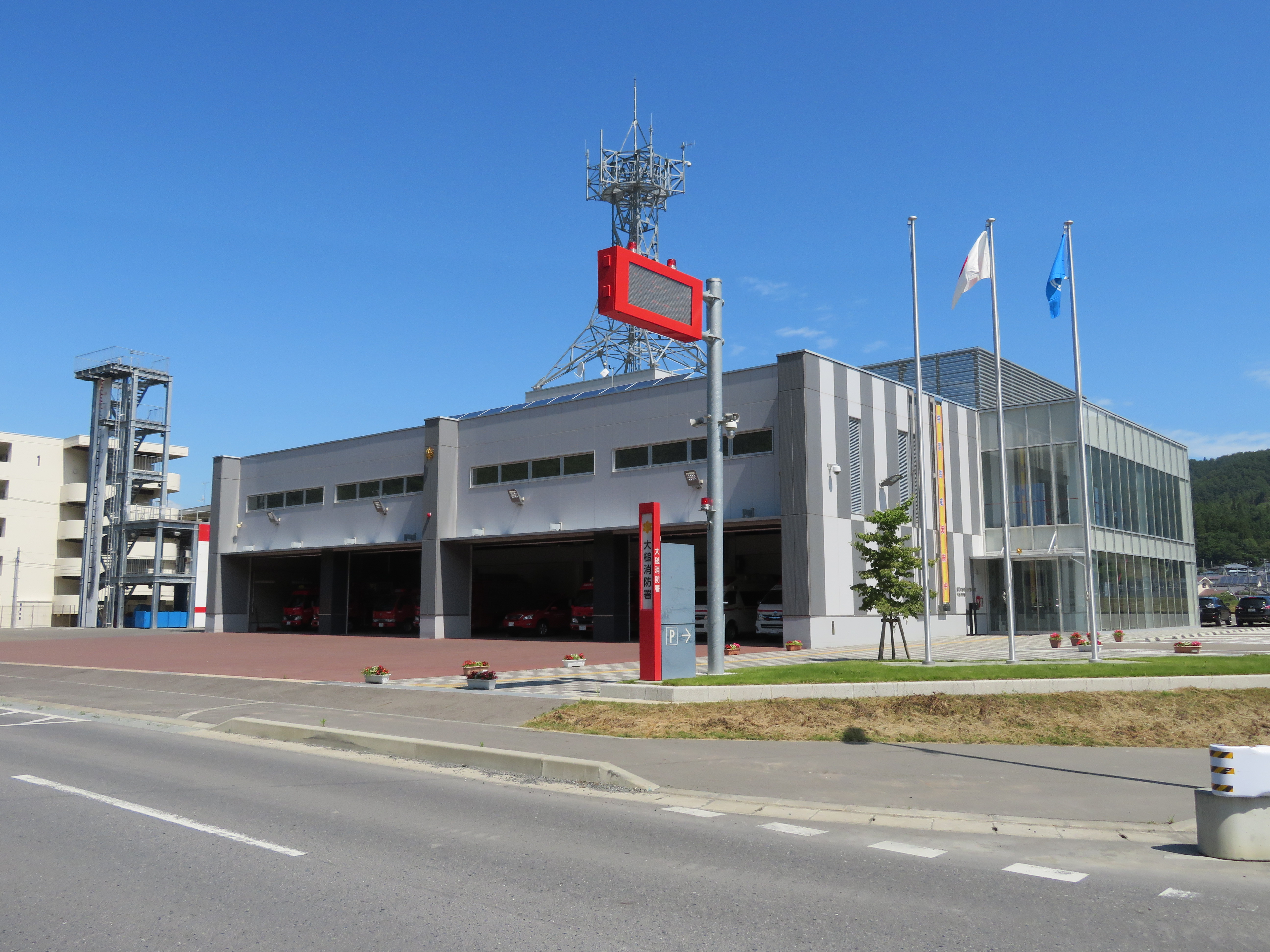 釜石大槌地区行政事務組合消防本部大槌消防署庁舎